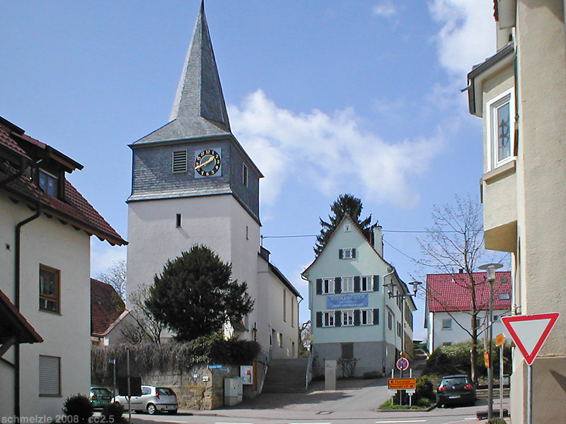 Kirche und Mörike-Museum in Cleversulzbach